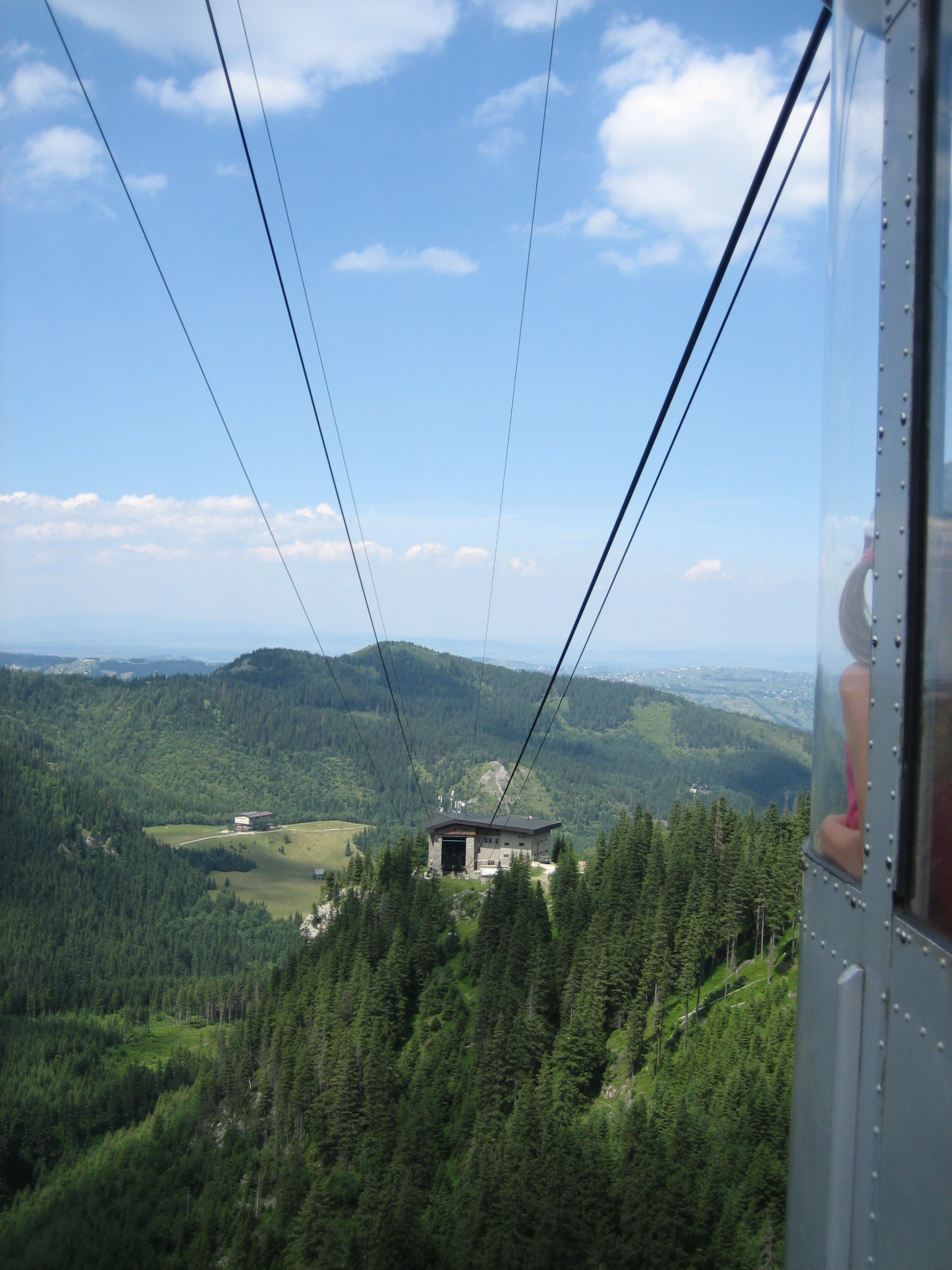 Kolejka na Kasprowy Wierch, widok na Myślenickie Turnie